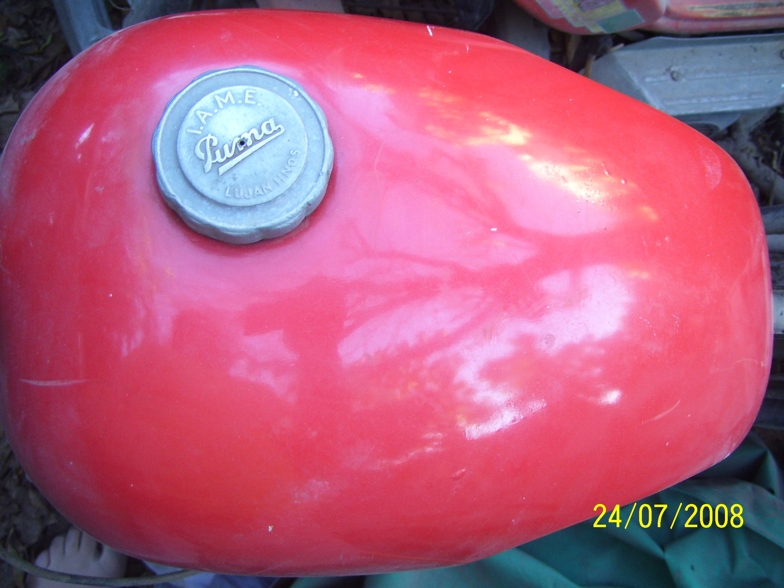 Tanque de combustible conpintura original y rojo característico y tapa con inscripción "IAME"